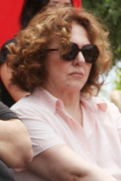 Eduardo Frei estuvo en la comuna de La Granja donde compartió con representantes de la comunidad.